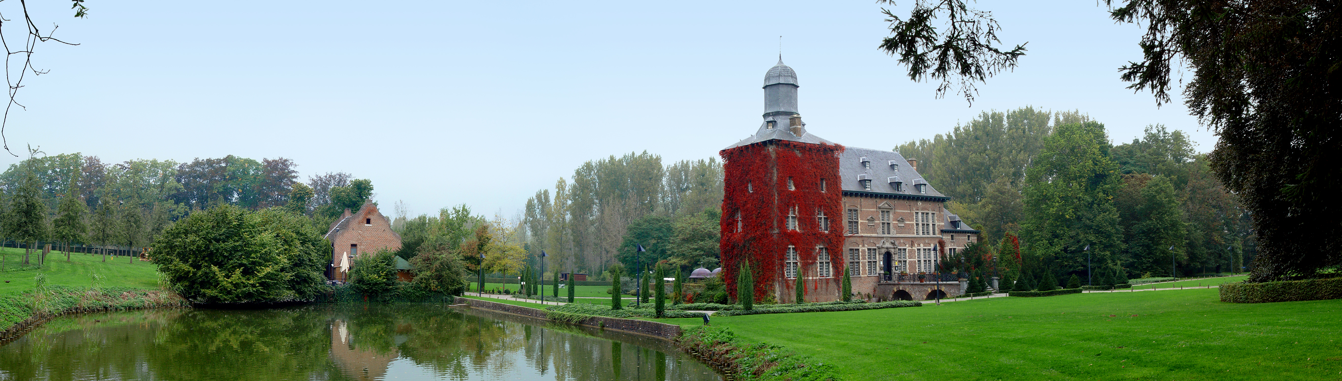 Beschreibung: Das Kasteel van Rullingen Aufnahmedatum: 12. Oktober 2006 Fotograf: ArtMechanic